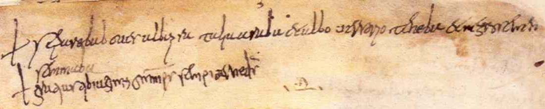 Biblioteca Capitolare di Verona MS. LXXXIX f. 3r, cropped to show text of the Veronese Riddle (Indovinello Veronese)